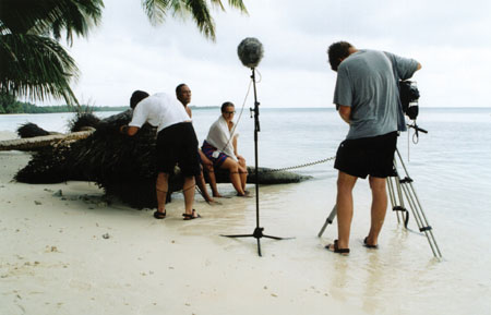 Nikolaus Geyrhalter dreht in Mikronesien für ELSEWHERE (Film), 2001